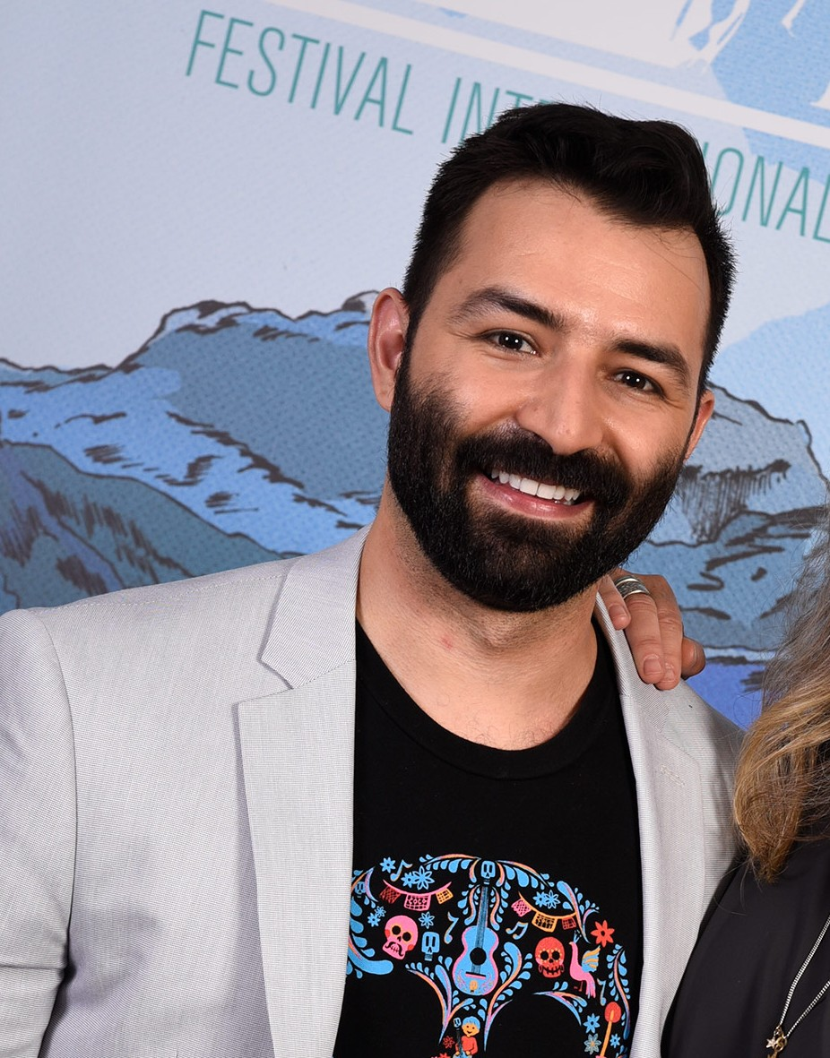 Adrian Molina au festival international du film d'animation d'Annecy 2017.